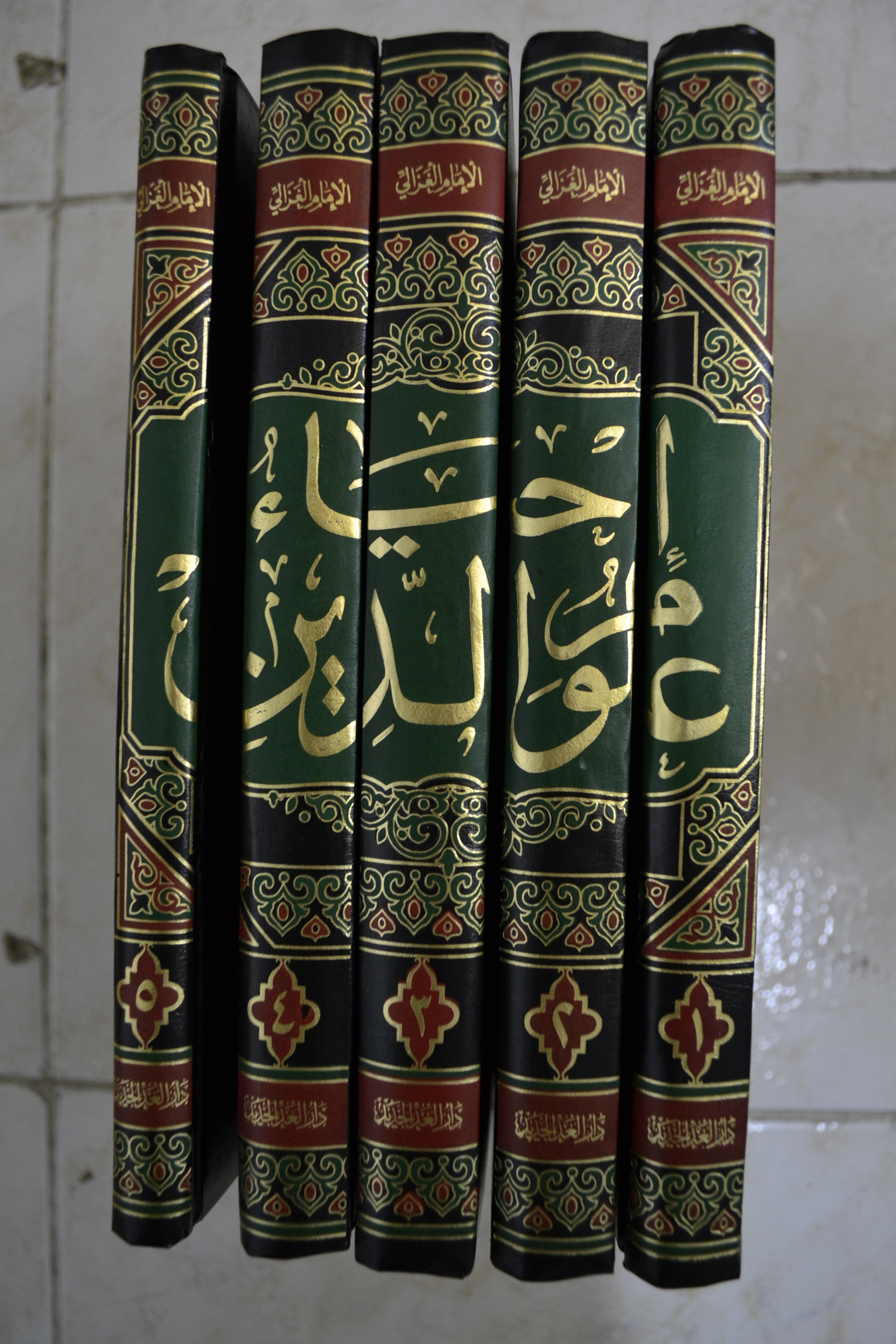 Ihya 'Ulumuddin merupakan Kitab yang membahas tentang Fikih dan Tasawuf, ditulis oleh Imam al-Ghazali